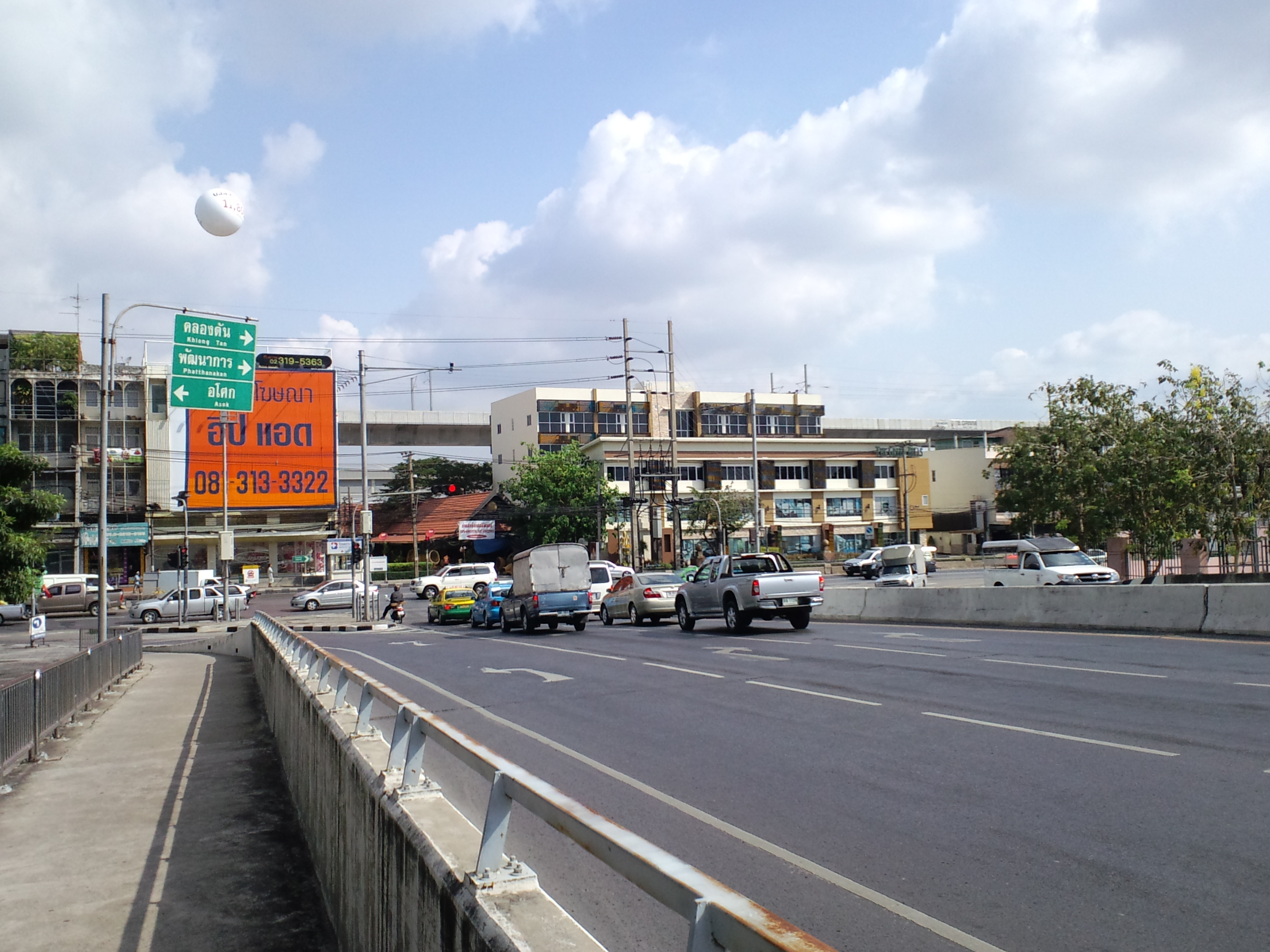 Bang Kapi, Huai Khwang, Bangkok, Thailand